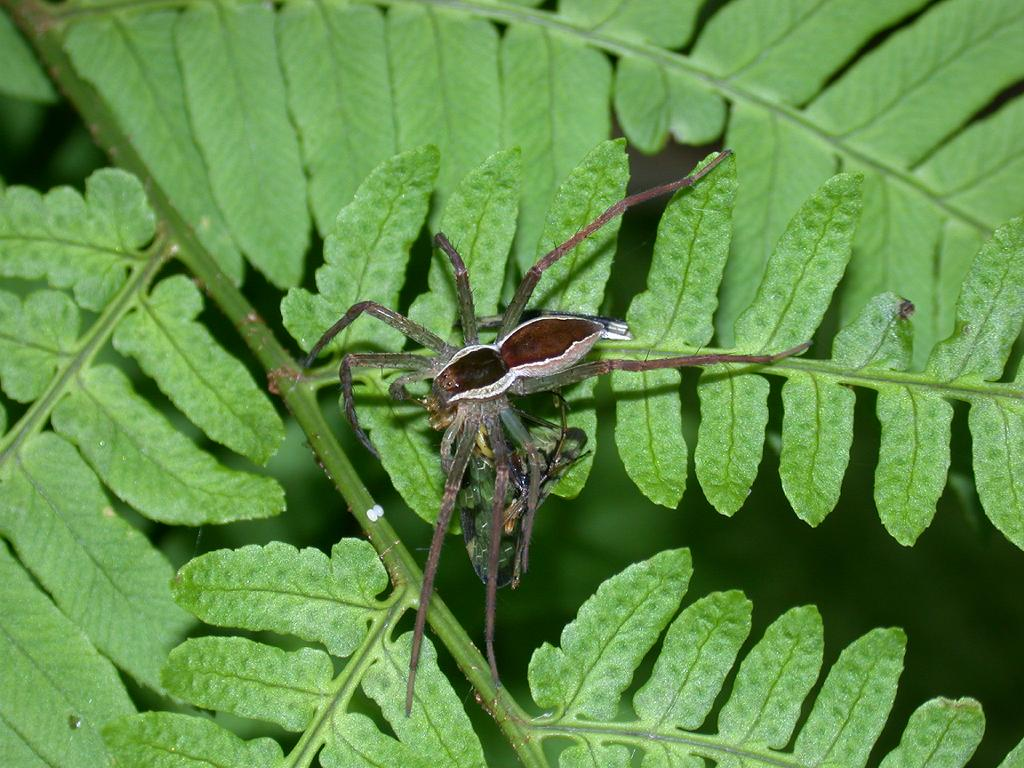 2002/05/05 和歌山県田辺市：Tanabe City. Wakayama Pref. Japan